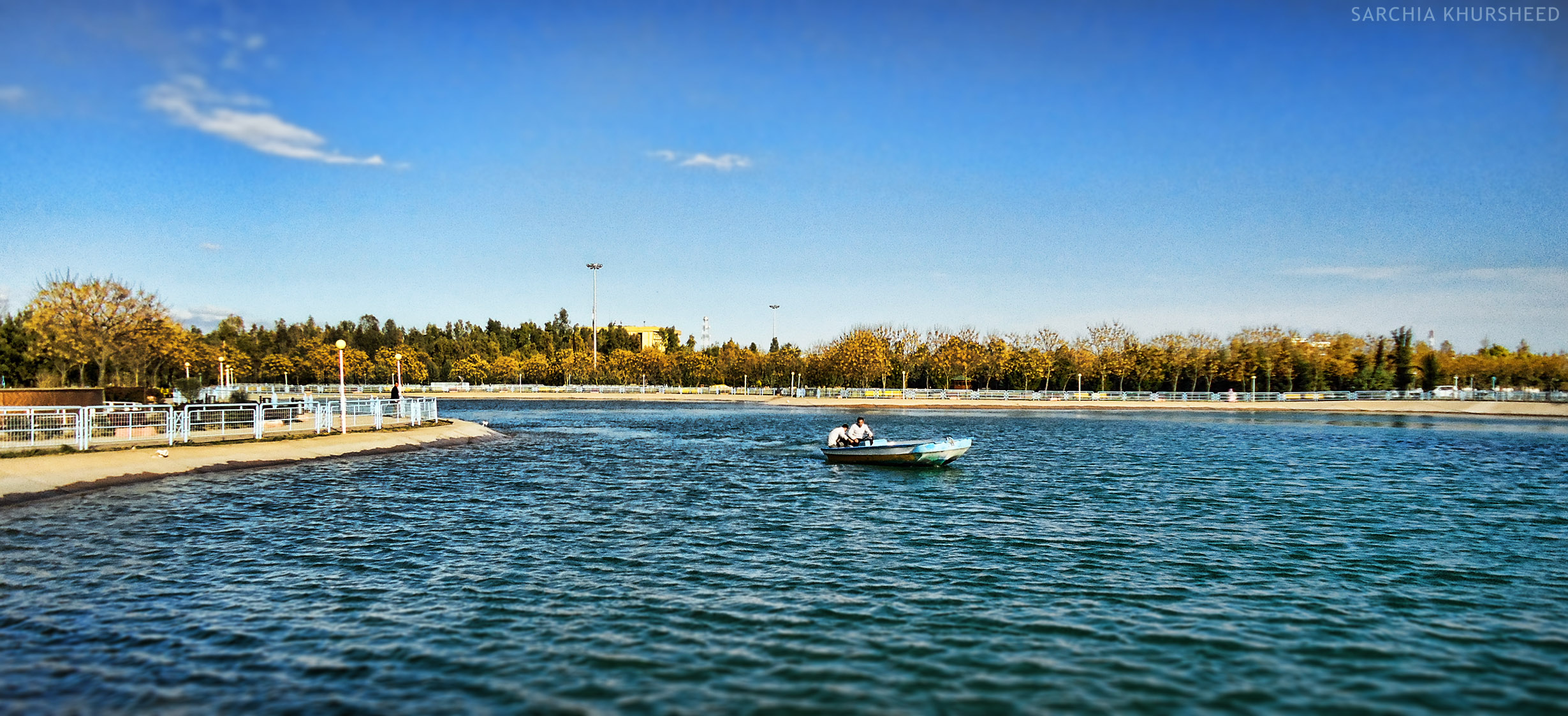 Kurdî: دیمەنێک لە دەریاچەی دەستکردیی پاڕکی سامی عەبدولڕەحمان لە ھەولێر.